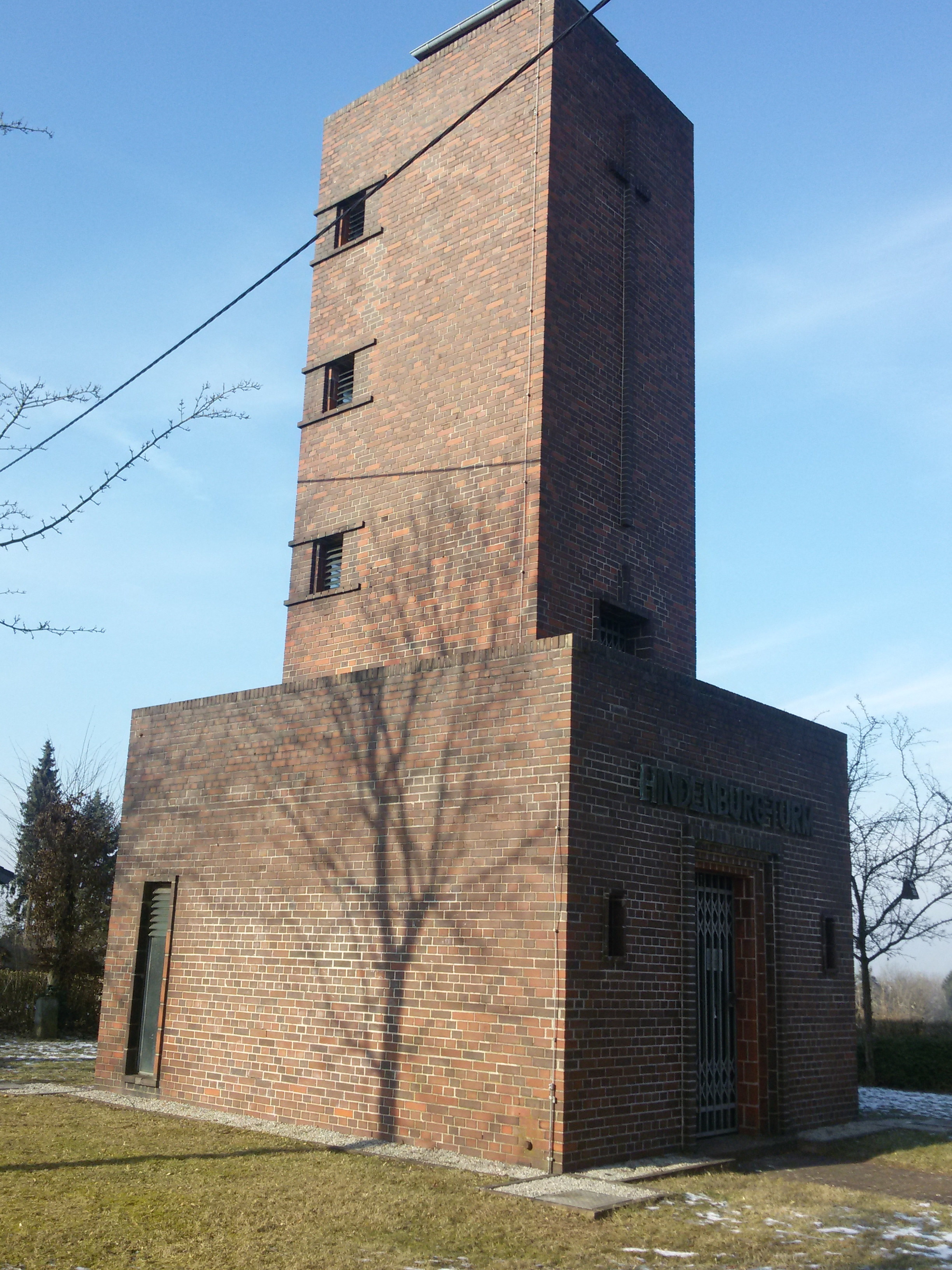 Hindenbergturm Riegelsberg